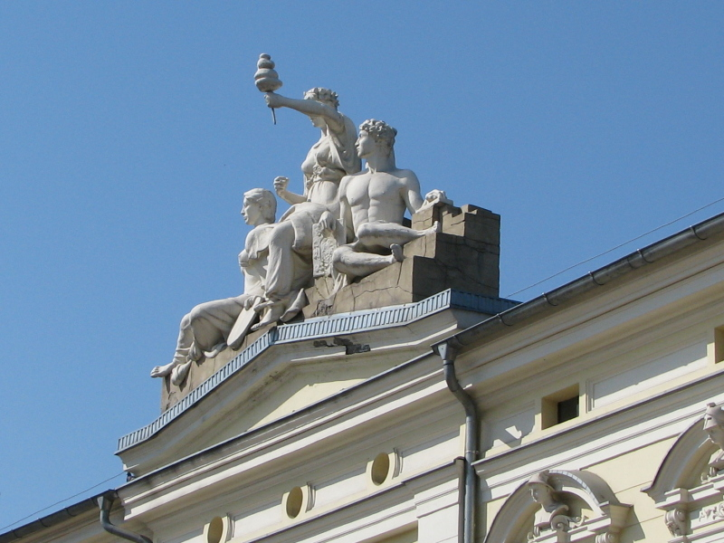 Pabianickie "prządki".